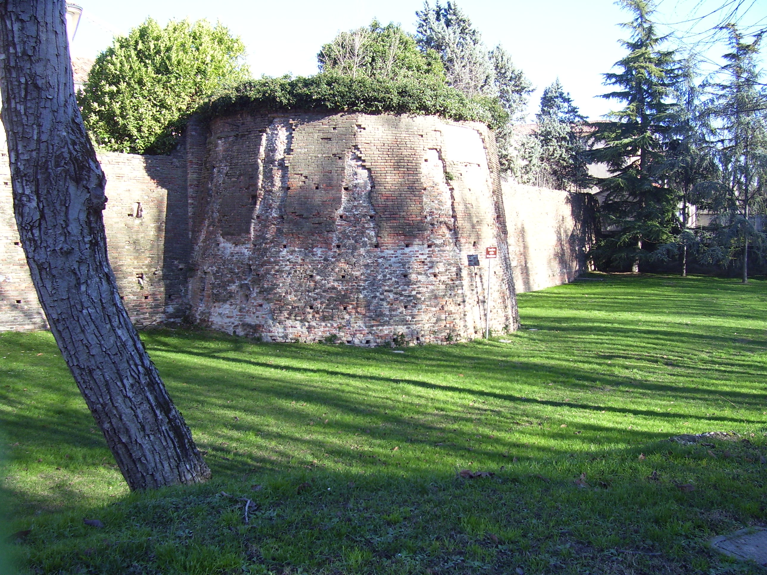 Mura Venete a Crema (CR)